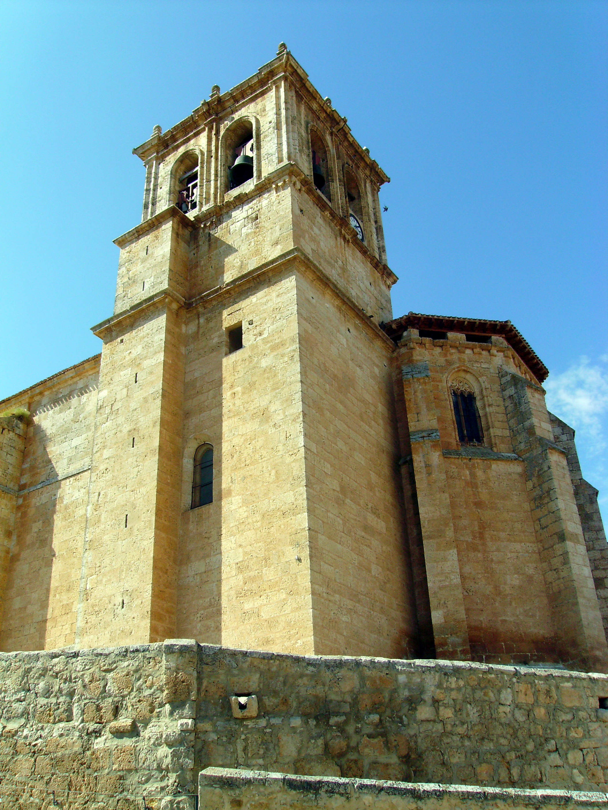 Vista desde abajo de la Iglesia de Olmedillo de Roa